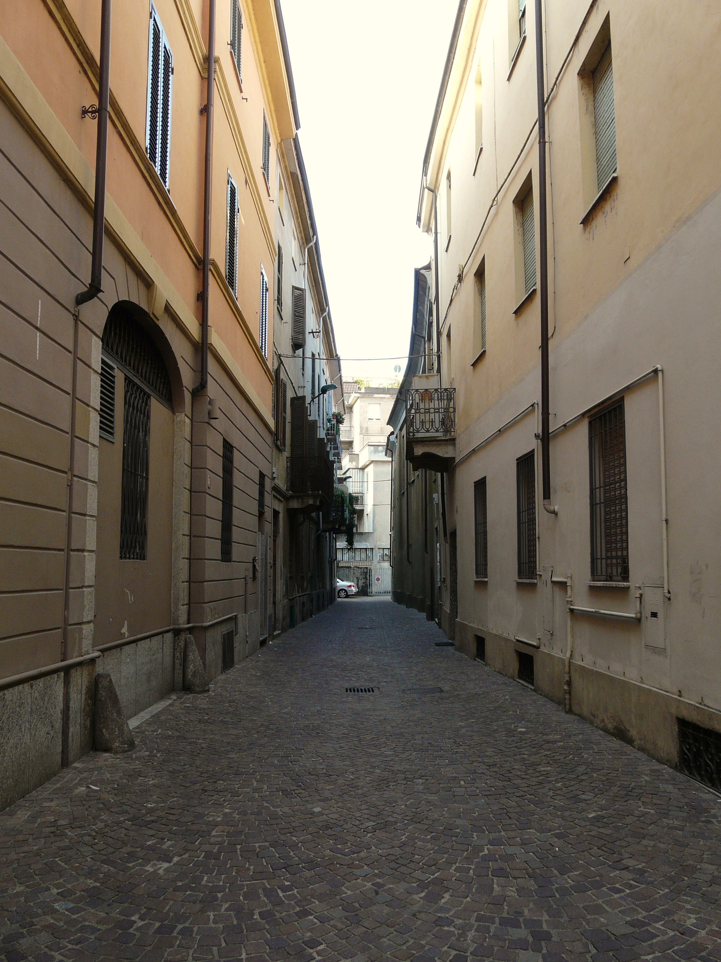 Ghetto ebraico presso la sinagoga di Casale Monferrato, Piemonte, Italia